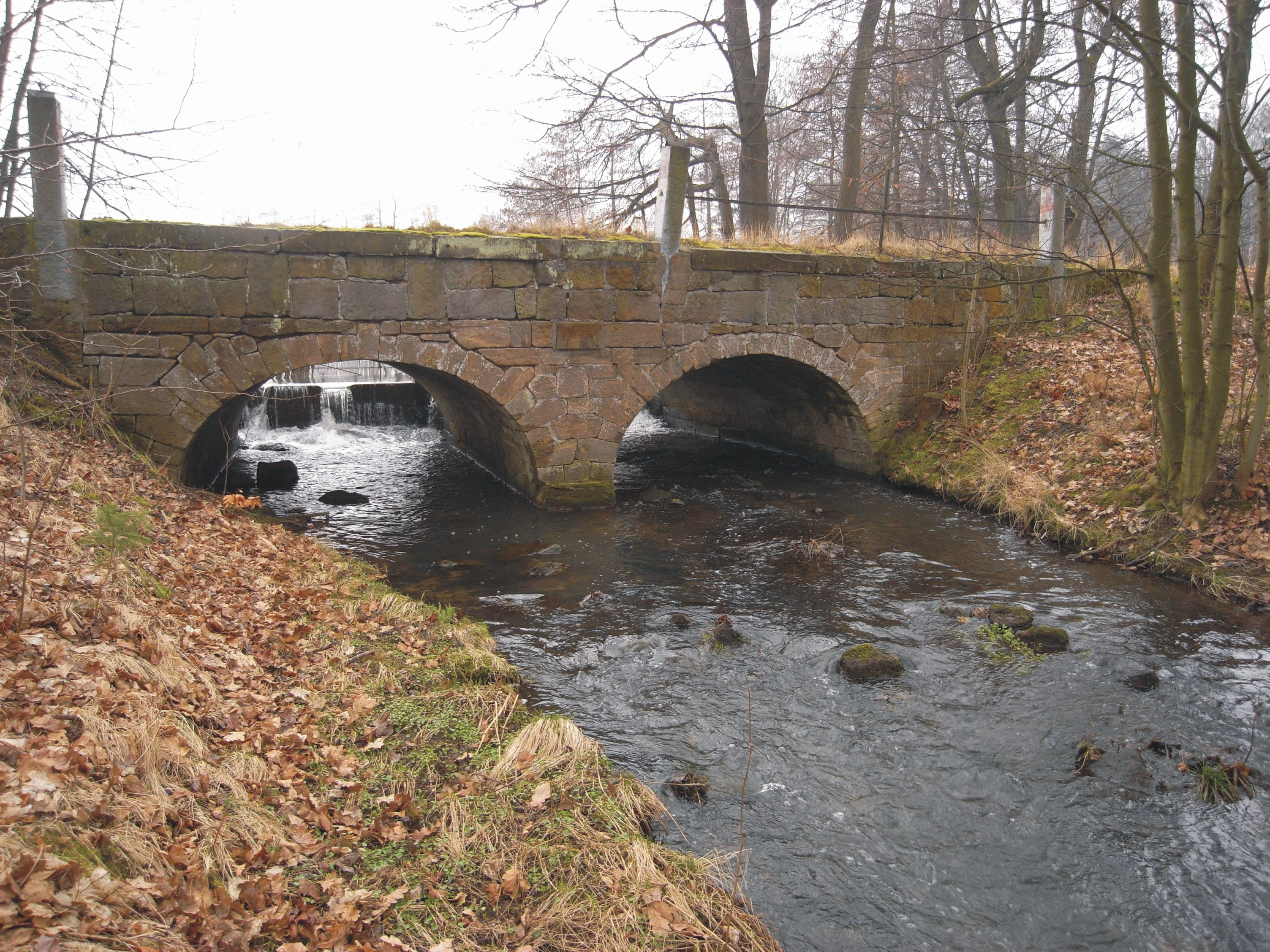 Oelsabach am Hafterteich (Dippoldiswalder Heide) Sachsen, Deutschland